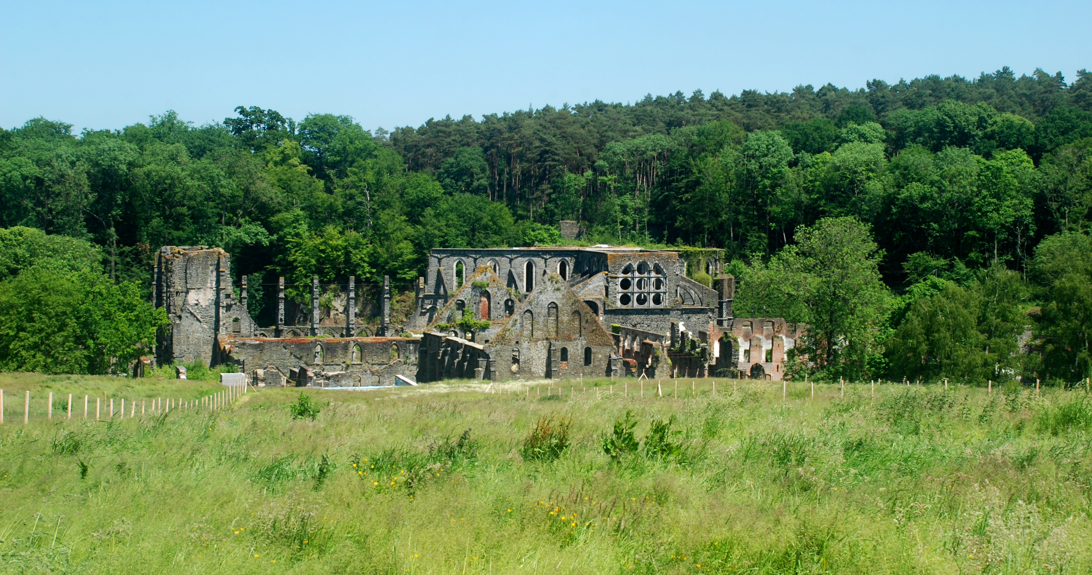 Belgique - Brabant wallon - Villers-la-Ville - Vue sur les ruines de l'abbaye depuis le plateau agricole et le mur d'enceinte intérieur